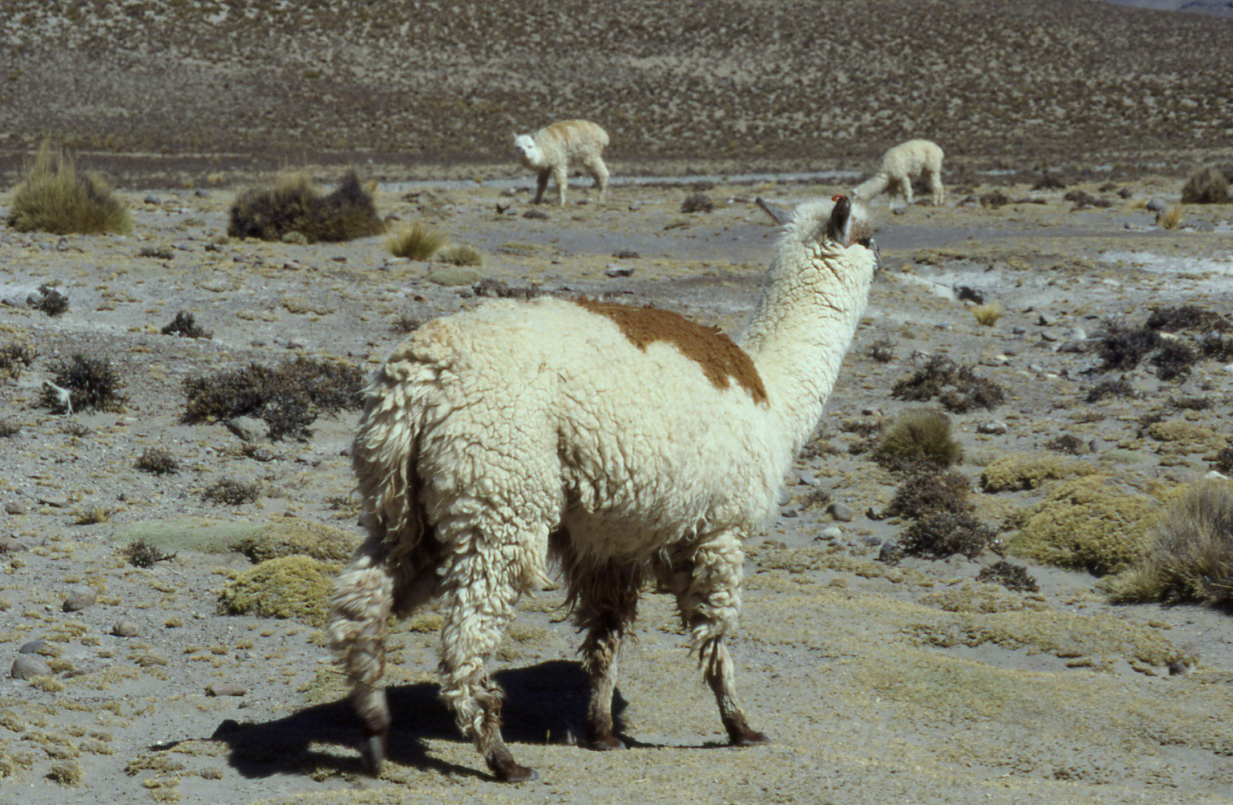 Alpaca bij Arequipa in Peru. Foto gemaakt door Arjen Mulder (eigen werk)